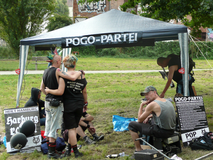 Zelt der Pogo-Partei 2008 auf dem Fährmannsfest in Hannover